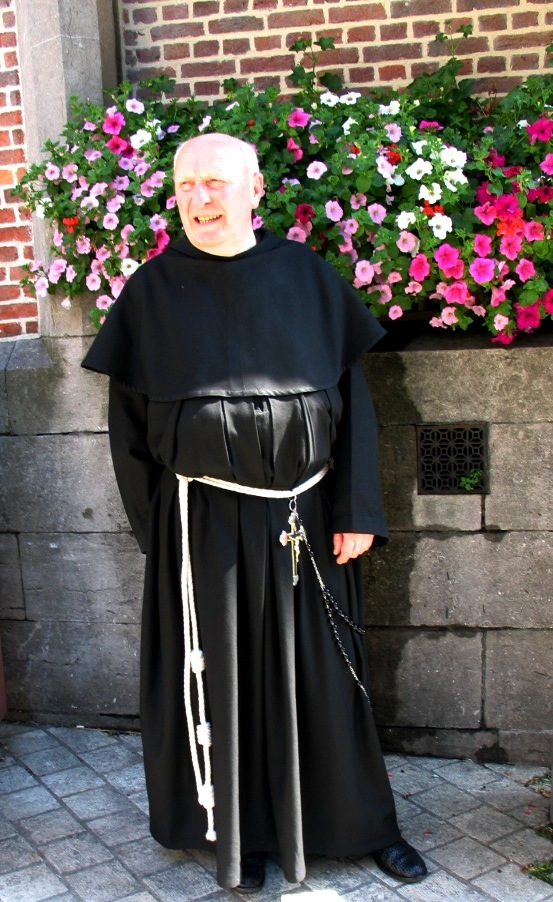 Pater Pax (Willem de Rooij), een franciscaan overleden op 27 februari 2010 - gefotografeerd in Halle